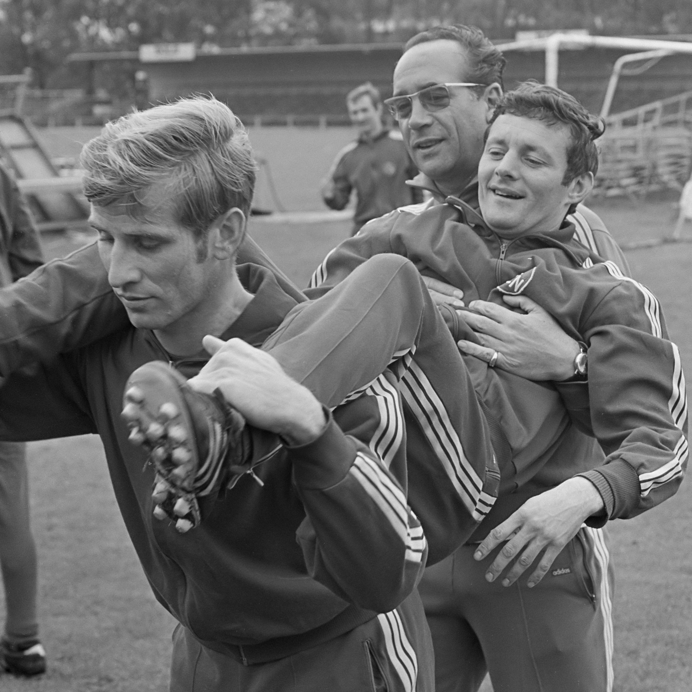 Voetbalclub FC Nurnberg traint olv. Max Merkel bij het Olympisch Stadion ter voorbereiding op de wedstrijd tegen Ajax. Merkel helpt Cebinac die op rug zit van achterspeler Popp 30 september 1968